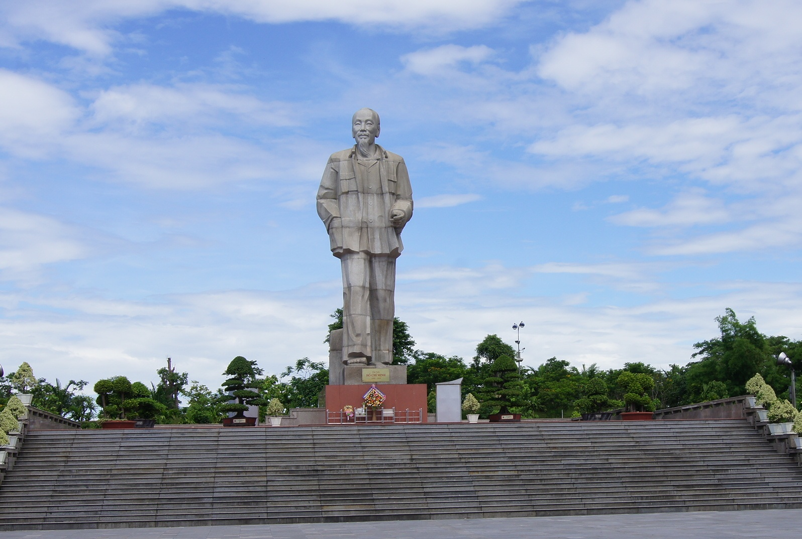 Quảng trường Hồ Chí Minh nằm ở thành phố Vinh, tỉnh Nghệ An